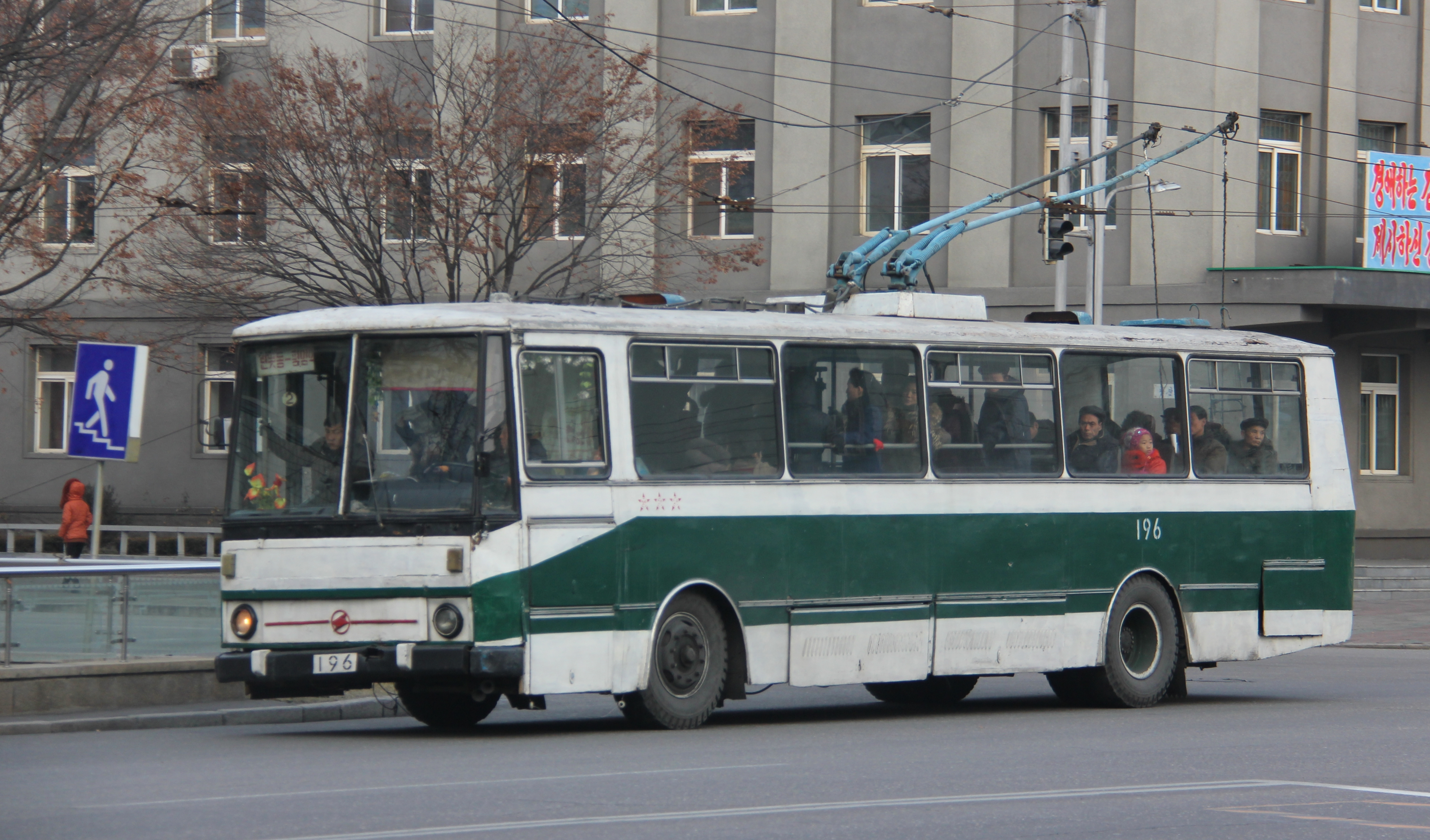 Pyongyang